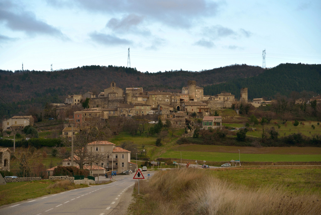 st vincent de barrès